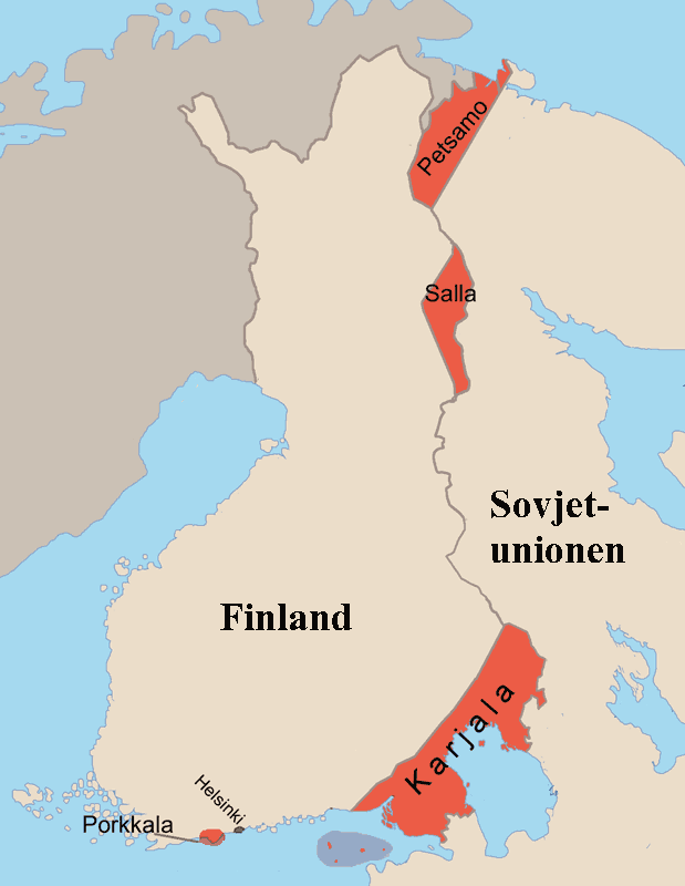 Finske tap etter freden i 1944.